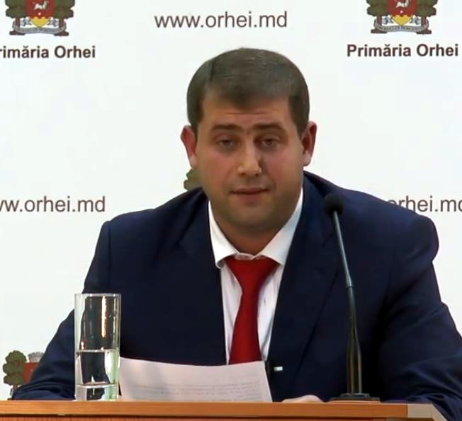 Primarul municipiului Orhei, Ilan Șor